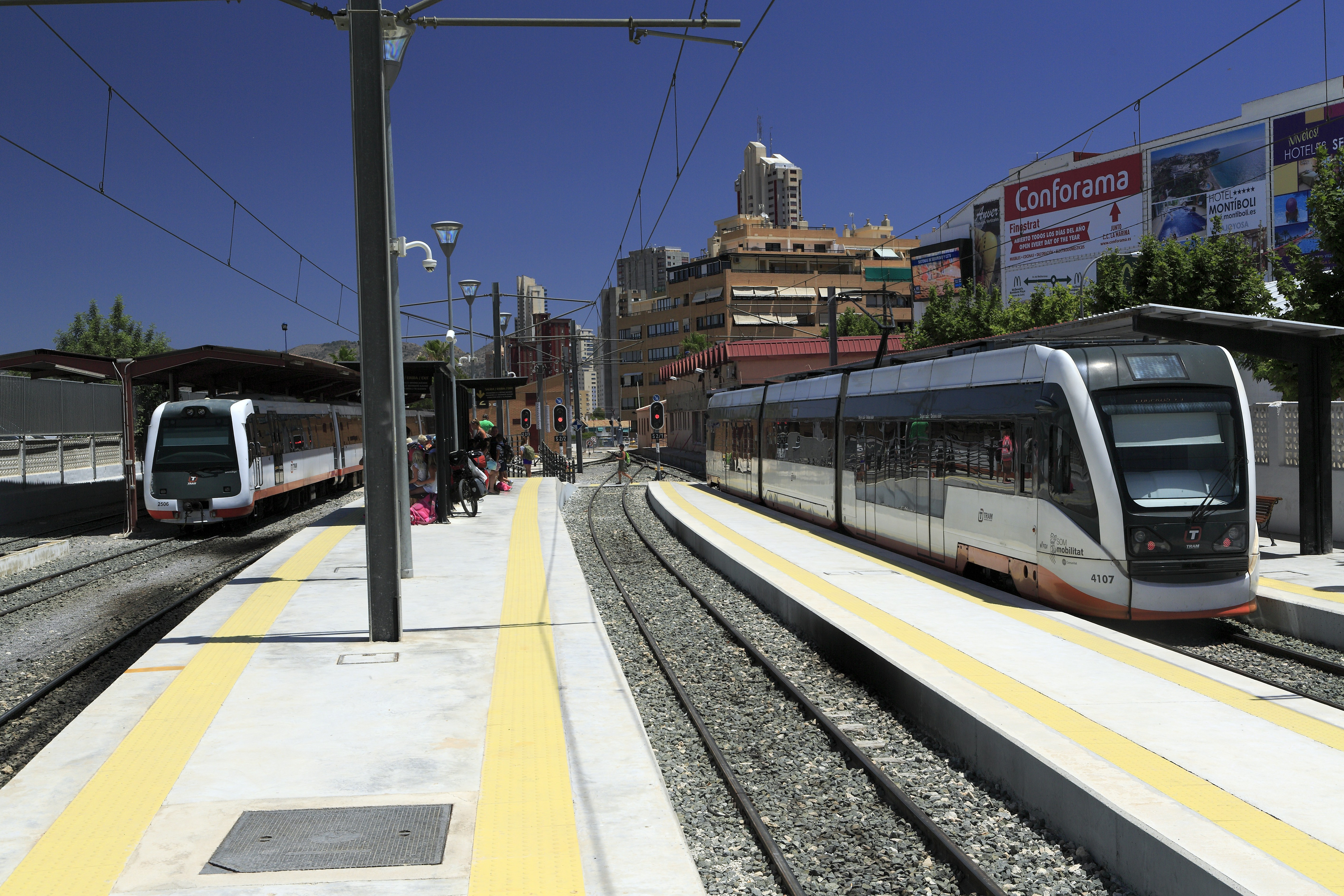 Richtung Osten, für drei Bahnsteiggleise gibt es einen Außen- und zwei Zwischenbahnsteige und dadurch je zwei Bahnsteigkanten für die nieder- und die Hochflureinheiten. Bahnsteiggleiches Umsteigen ist jedoch so nicht möglich. Die Strecke Richtung Alicante ist komplett auf den Einsatz von Wagen mit Niederflureinstiegen ausgelegt, die in Richtung Dénia für Hochflureinstiege. Die Fahrleitung endet bisher hier im Bahnhof Benidorm.Der Zug rechts ist eine Planeinheit von und nach Alicante-Luceros, der Doppeltriebwagen links eine Reserveeinheit für die Strecke nach Dénia. Zum Aufnahmezeitpunkt ist sie wegen Bauarbeiten nur bis Calpe in Betrieb.